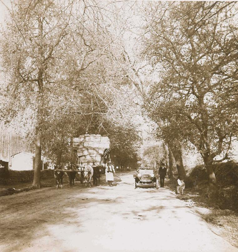 Antigua fotografía de la Avenida Macul en Santiago de Chile.